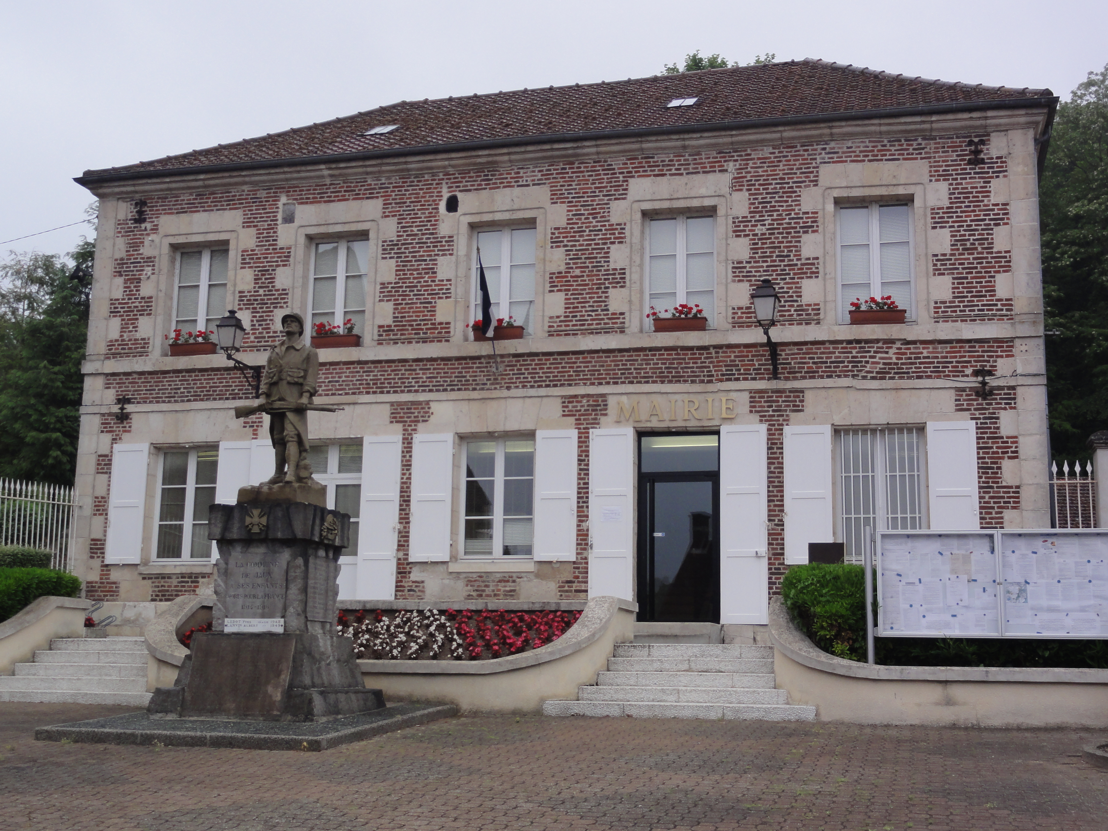 Jaux (Oise) Mairie et monument aux morts